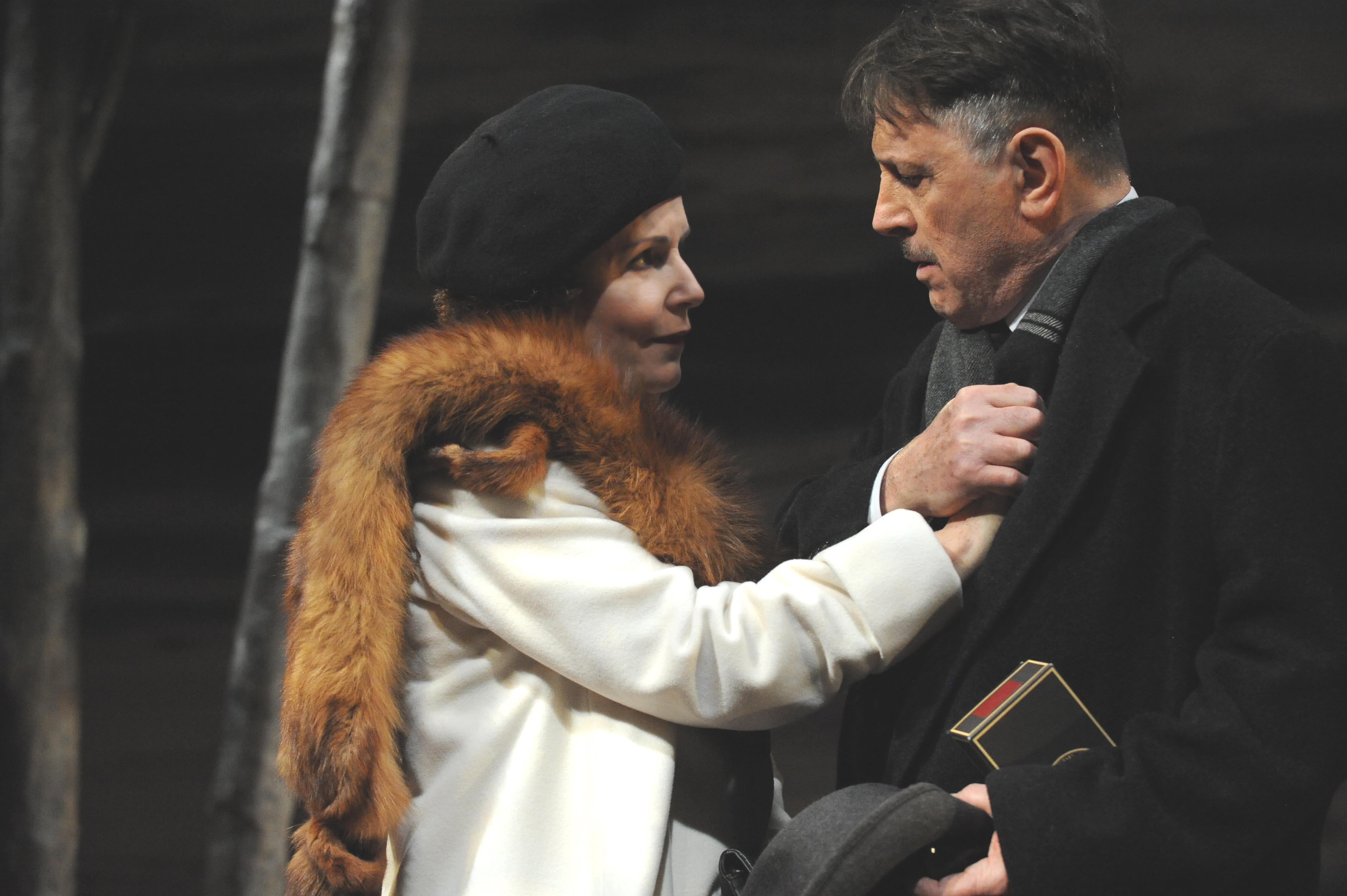 ההצגה הבנליות של האהבה, מאת סביון ליברכט, בבימויו של אבישי מילשטיין, תיאטרון בית ליסין, 2009